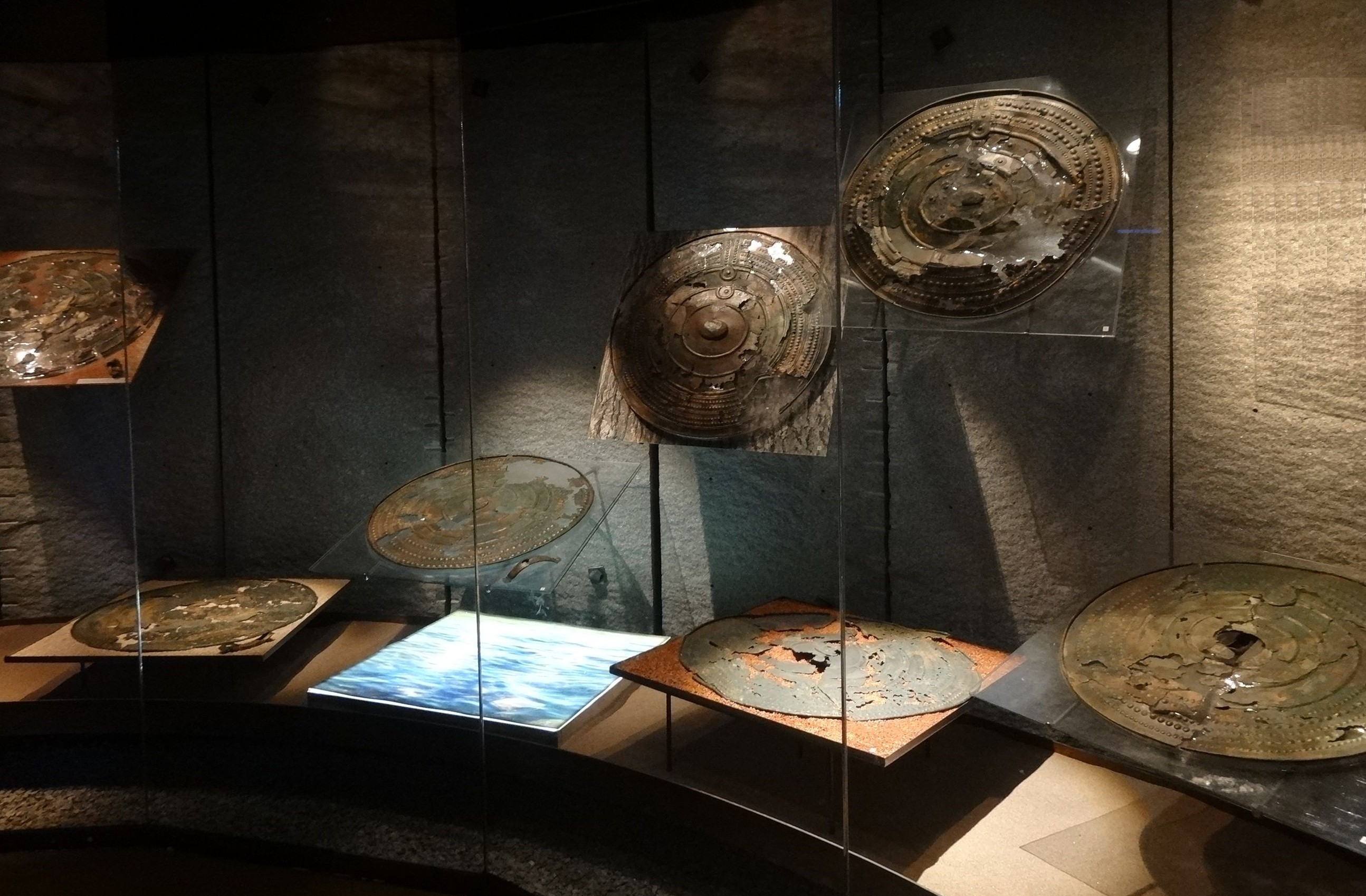 Några av Fröslundasköldarna, från utställningen "Mellan is och eld" på Västergötlands museum i Skara.